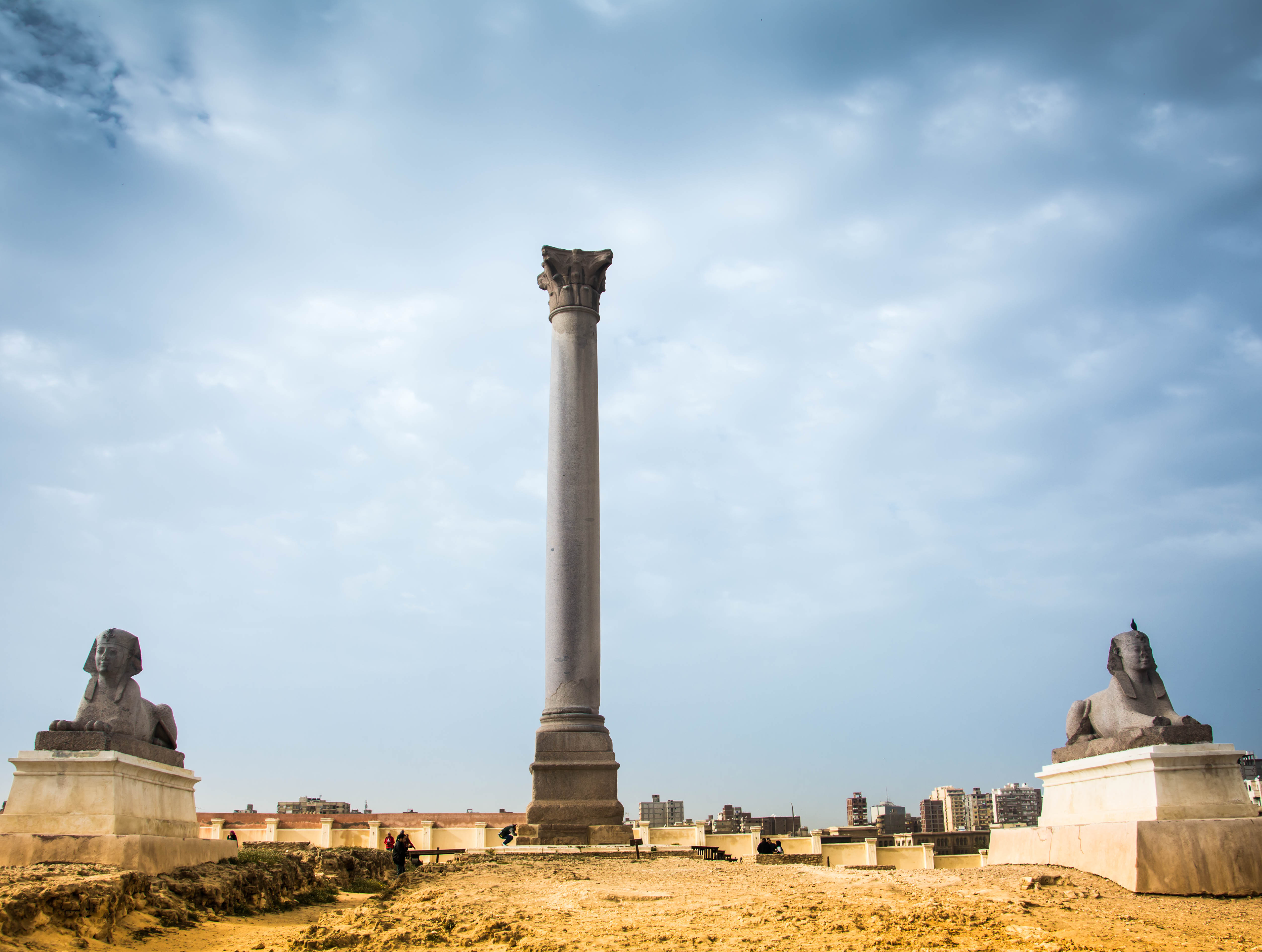 يعتبر عمود السواري من أشهر المعالم الأثرية في الإسكندرية. أقيم فوق تل باب سدرة بين منطقة مدافن المسلمين الحالية والمعروفة باسم مدافن العمود وبين هضبة كوم الشقافة الأثرية. ويصل طوله إلى حوالي 27 مترا ومصنوع من حجر الغرانيت الأحمر. أقيم تخليدا للإمبراطور دقلديانوس في القرن الثالث الميلادي. وهو آخر الاثار الباقية من معبد السيرابيوم الذي أقامه بوستوموس.ويعتبر أعلى نصب تذكاري في العالم. لم يتم تحديد تاريخ إنشاء هذا العمود على وجه الدقة لكنه يعود للعصر الروماني، وقيل أن هذا العمود أهدي للمسيحية بعد انتصارها في الإسكندرية . التسمية